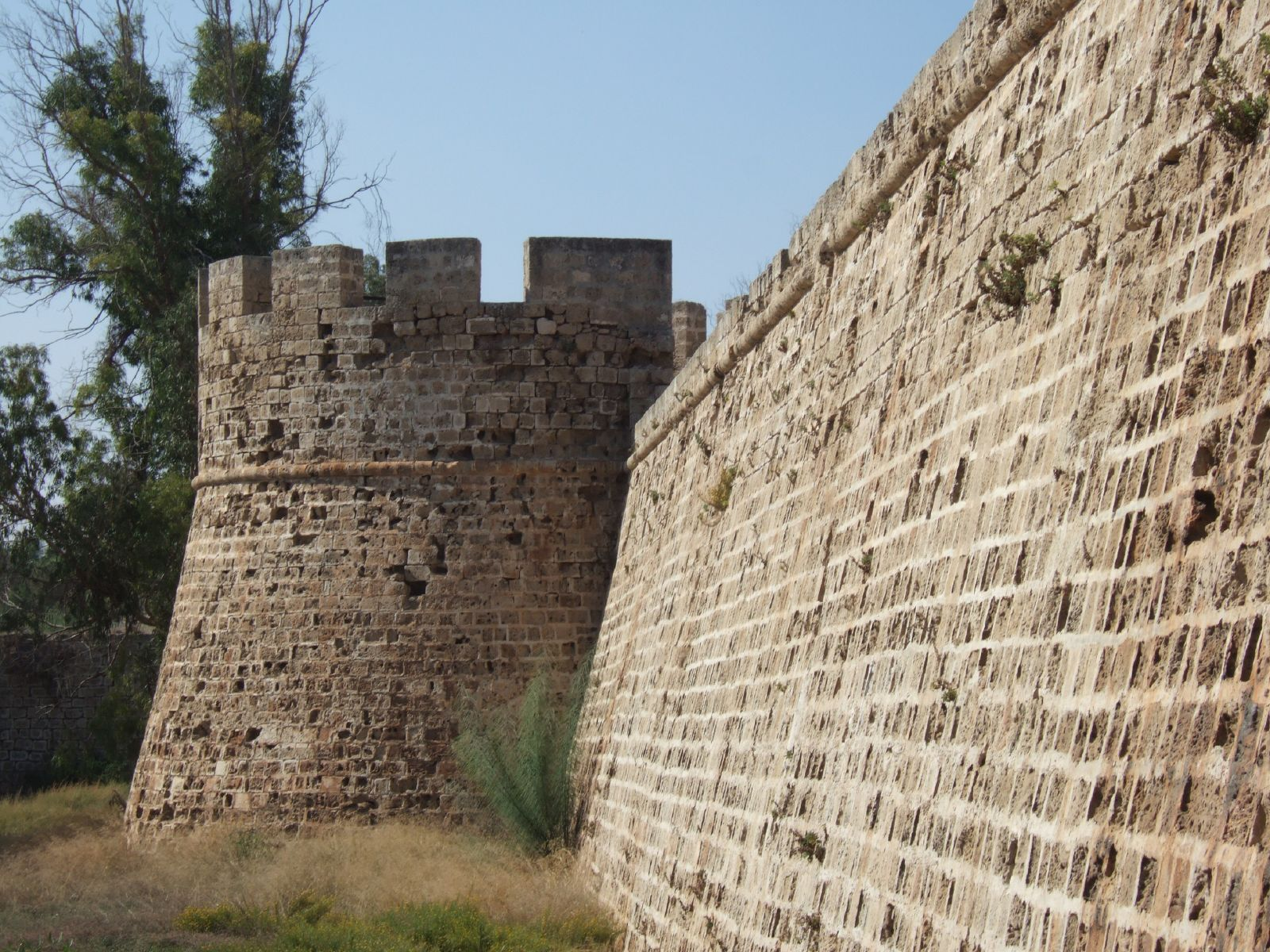 Famagusta, CiproWalls